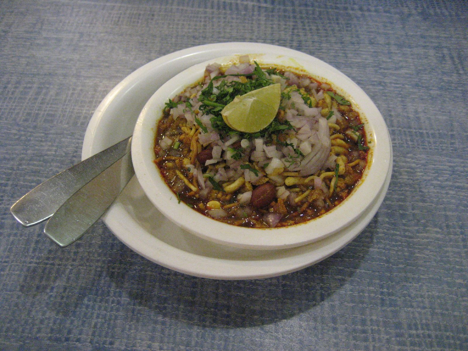 Misal